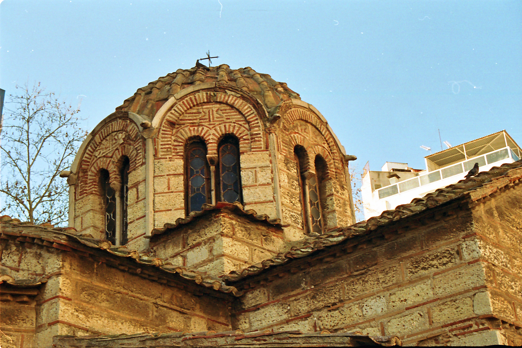 Ναός Αγίων Θεοδώρων, Αθήνα«Ναός Αγίων Θεοδώρων, Αθήνα»